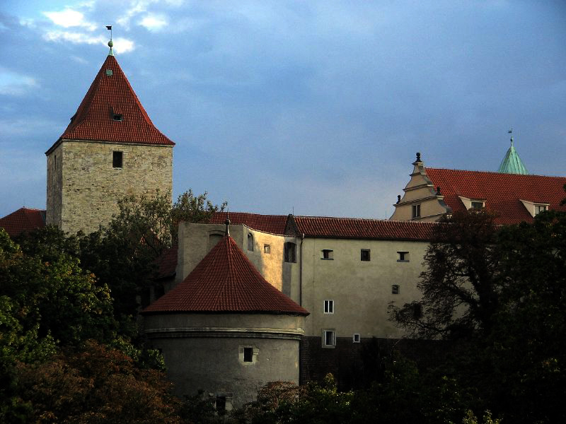 Pražský hrad, severovýchodní část, vlevo Černá věž, uprostřed Daliborka